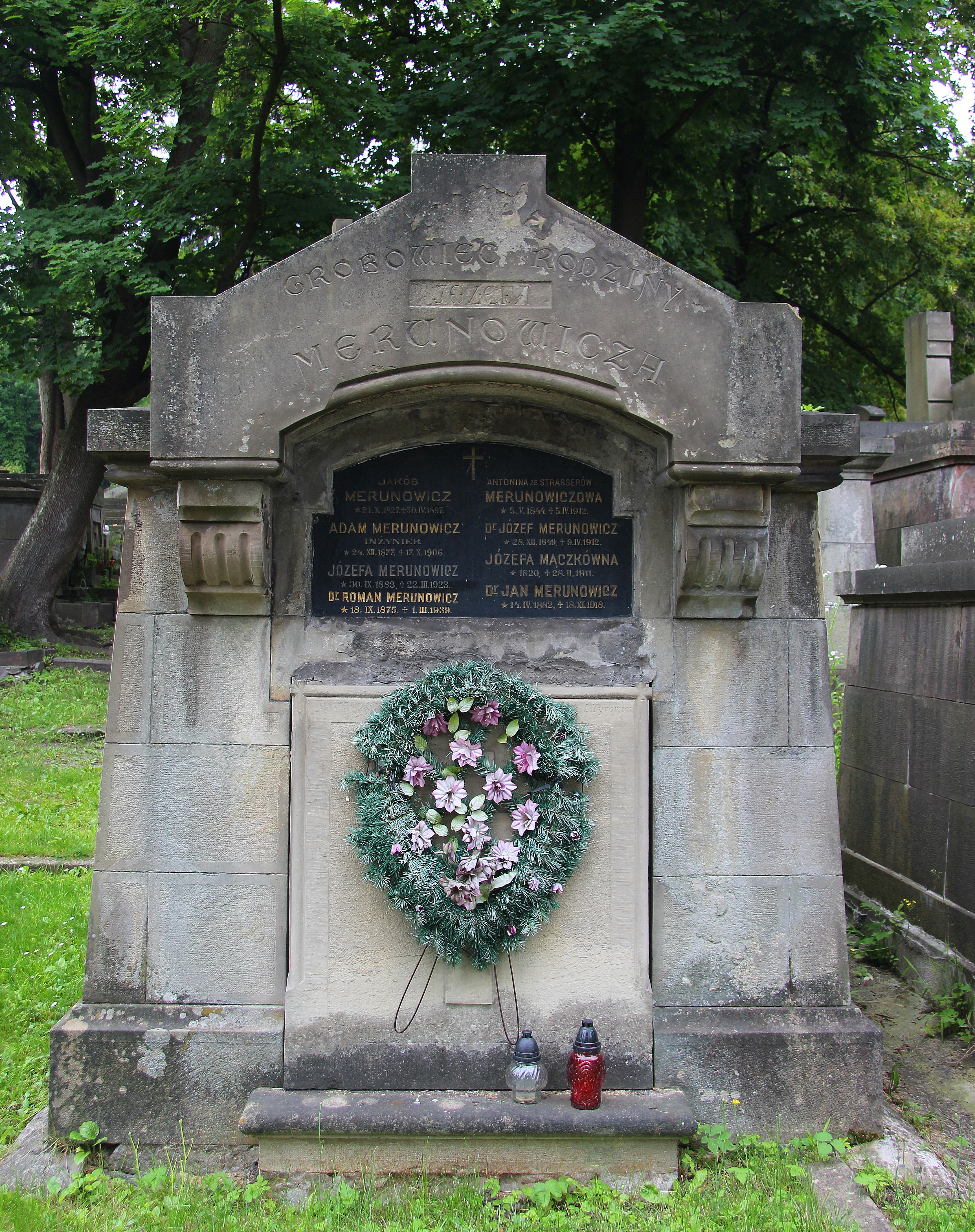 Гробівець родини Мериновичів. Личаківський цвинтар , 78 поле.